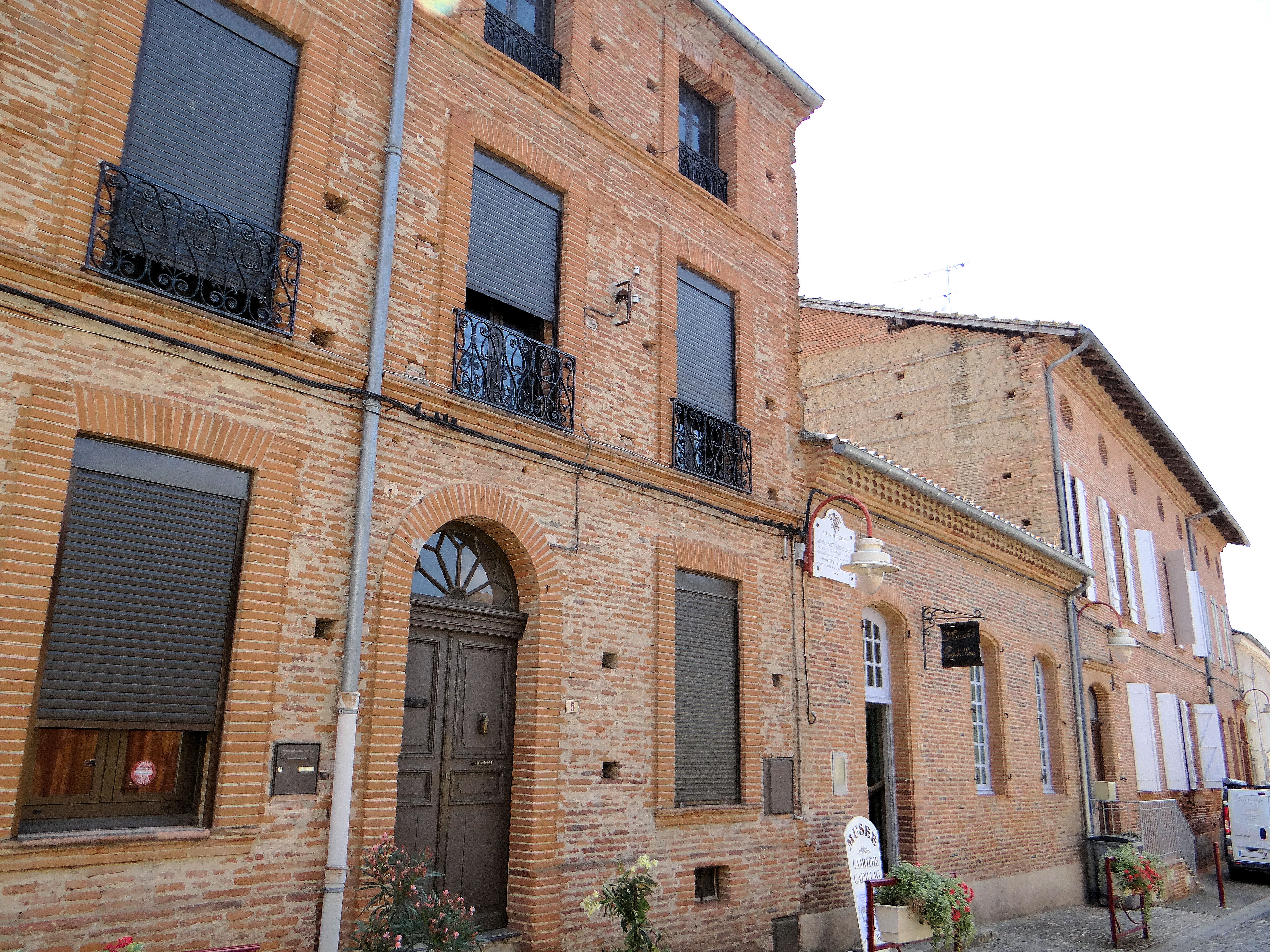 Saint-Nicolas-de-la-Grave - Maison natale du chevalier de Lamothe-Cadillac, entrée du musée Lamothe-Cadillac